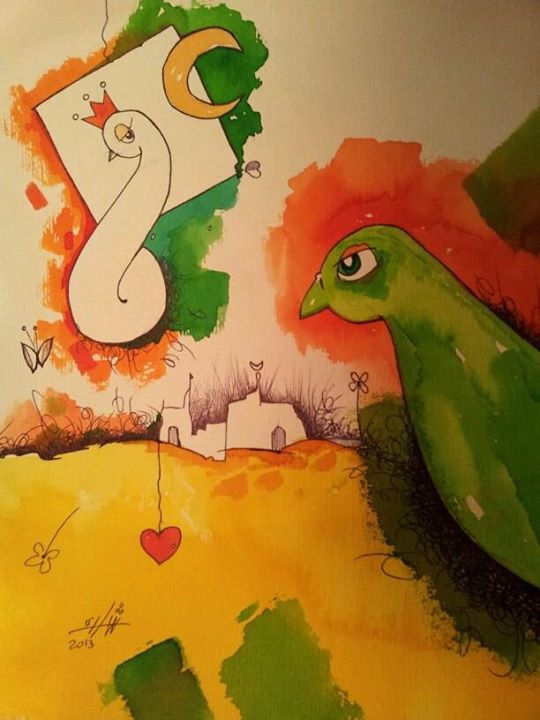 لوحه فنيه لشادى الدالى